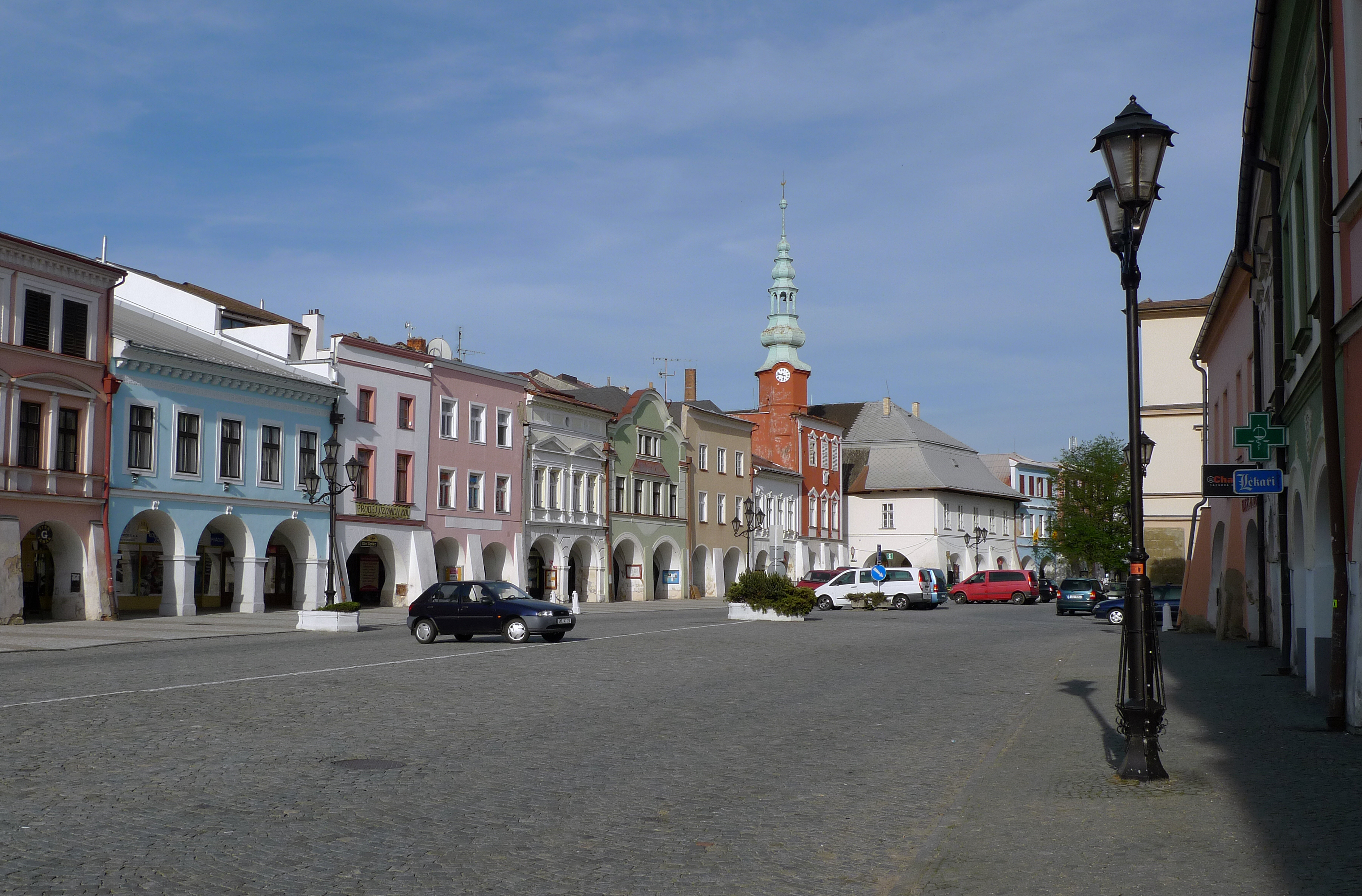 Svitavy - náměstí Míru